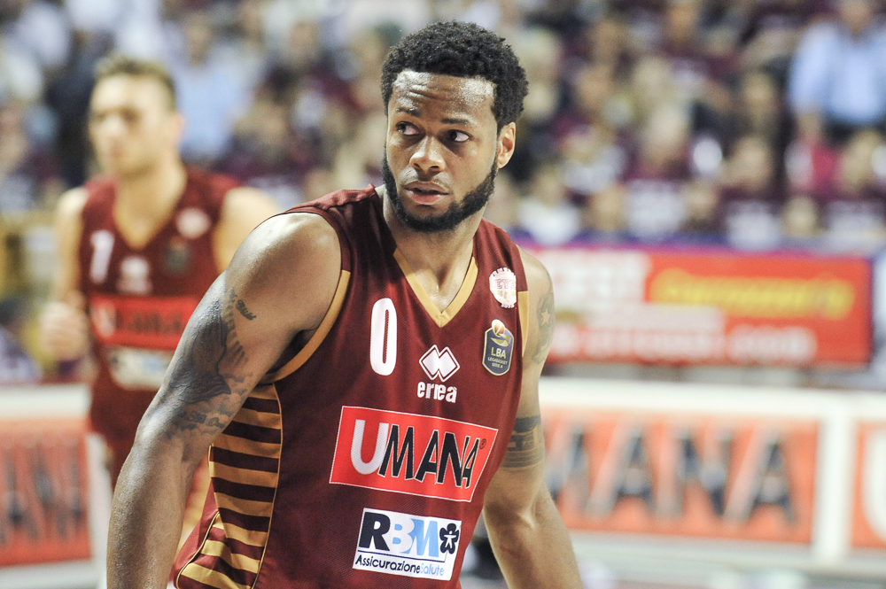 Marquez Haynes con la maglia della Reyer Venezia